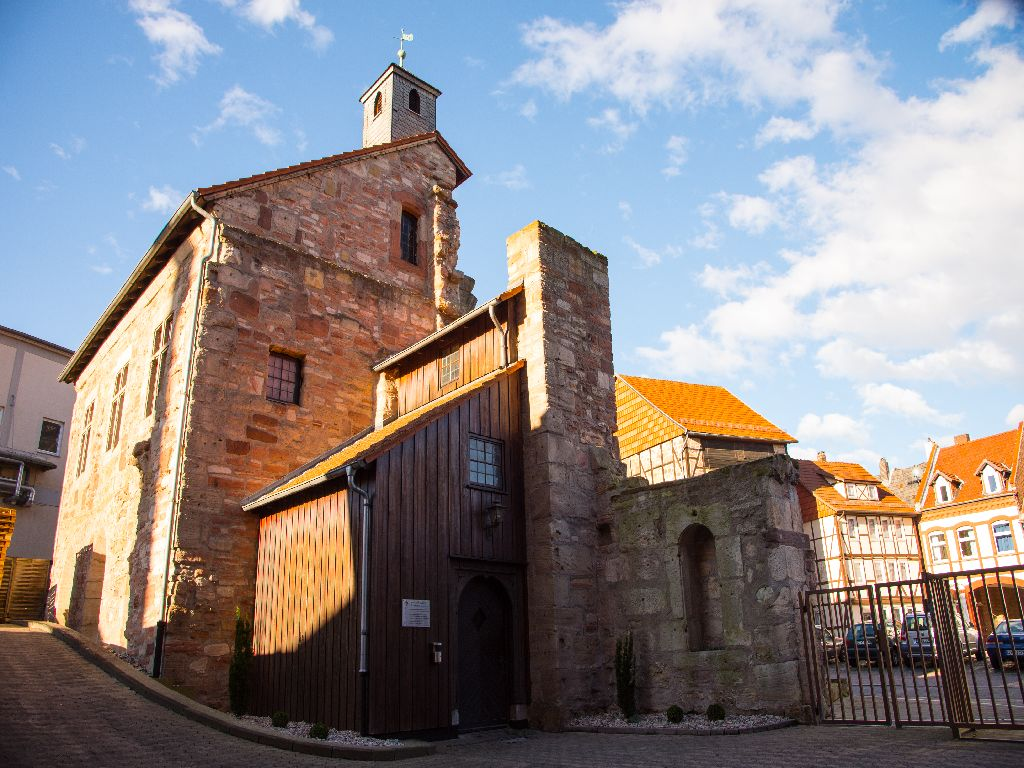 Die Kloster-Kapelle der Eschweger Klosterbrauerei wurde 2015 neu renoviert und wird für Brauereibesichtigungen genutzt. Außerdem finden Trauungen in der Kapelle statt.